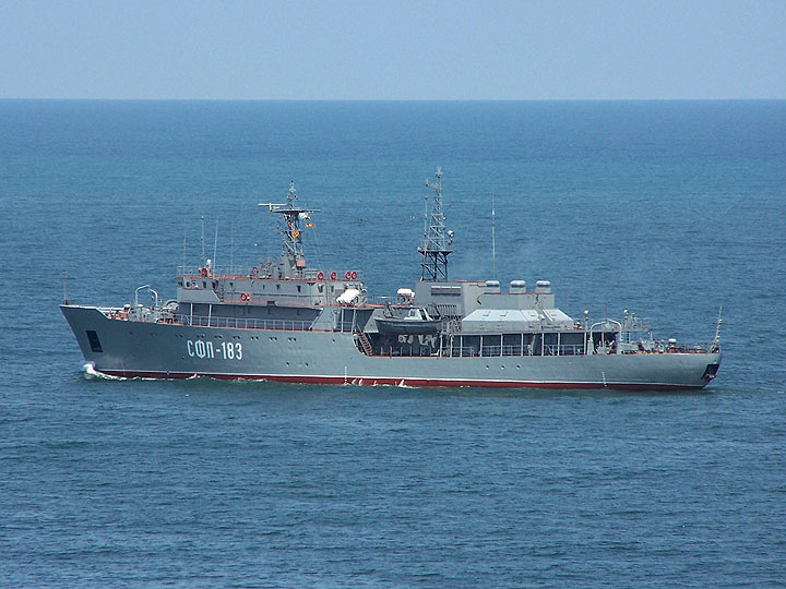 Судно контроля физических полей "СФП-183". Проект 18061. Севастополь. Черноморский флот РФ.